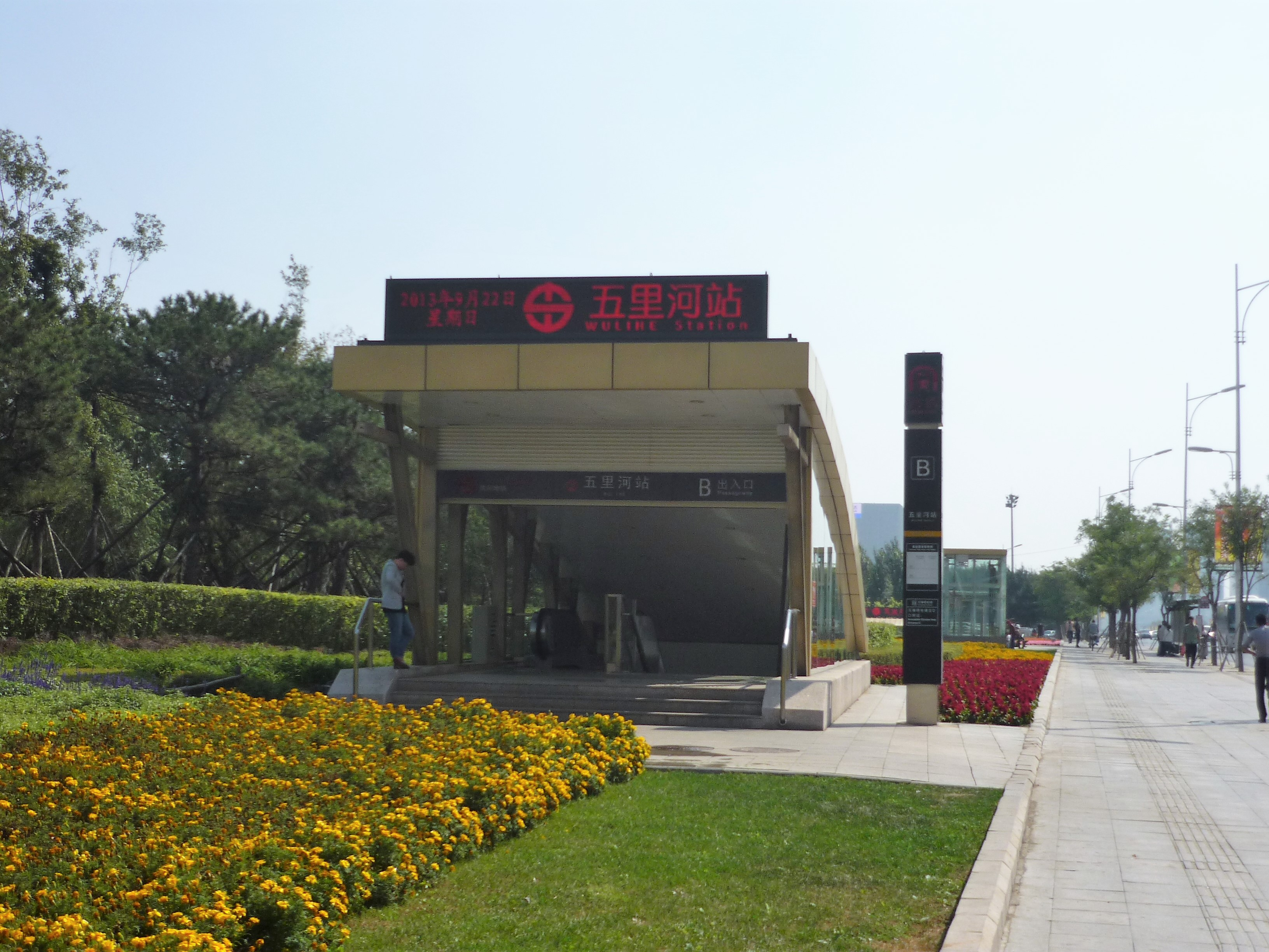 瀋陽地下鉄2号線の五里河駅